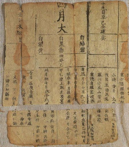 出土于黑水城遗址。采用活字印刷，约12世纪.